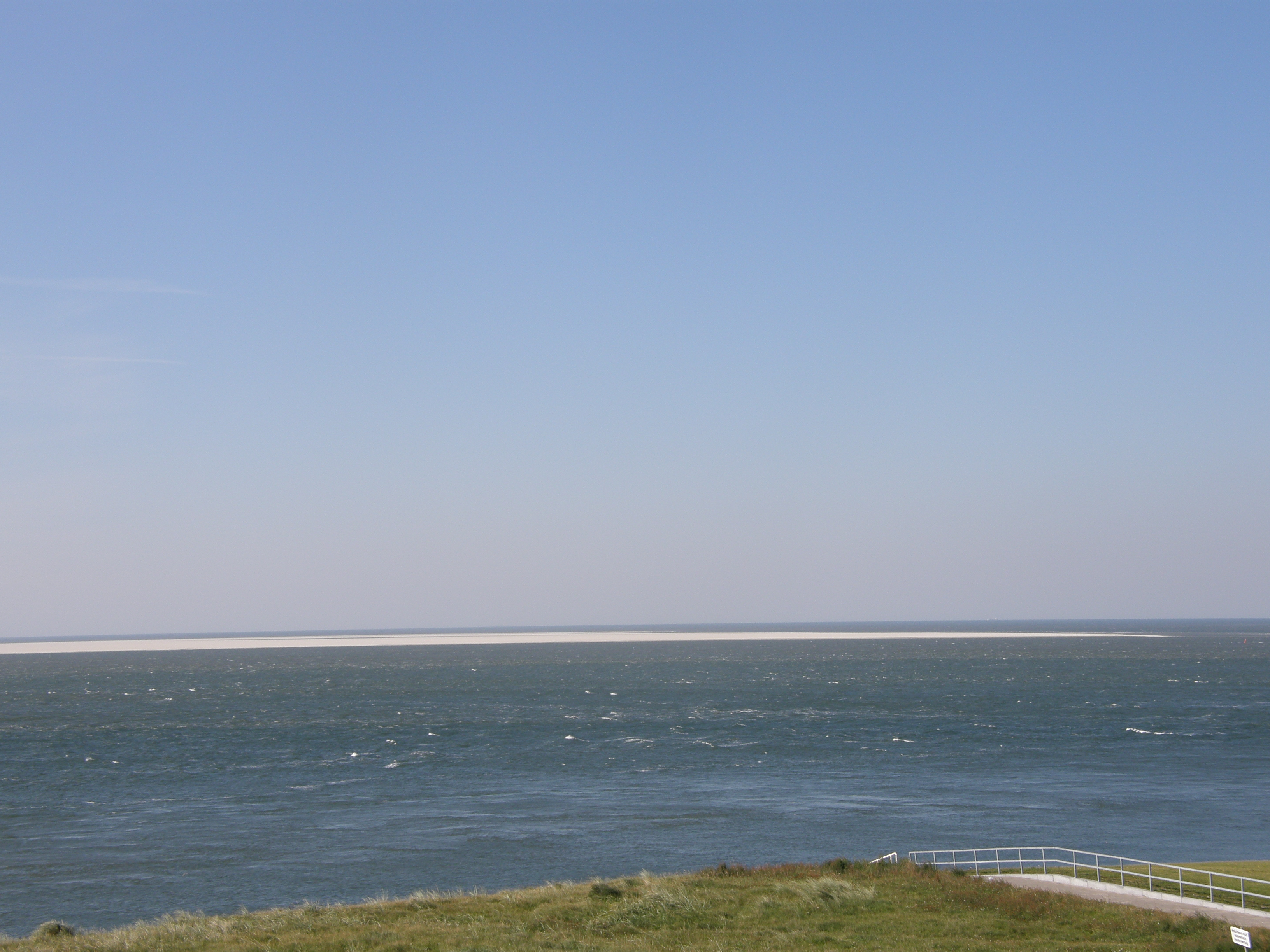 Fotostandort: Fort Kijkduin. Sandbank Noorderhaaks von Den Helder aus gesehen, nördlicher Teil.